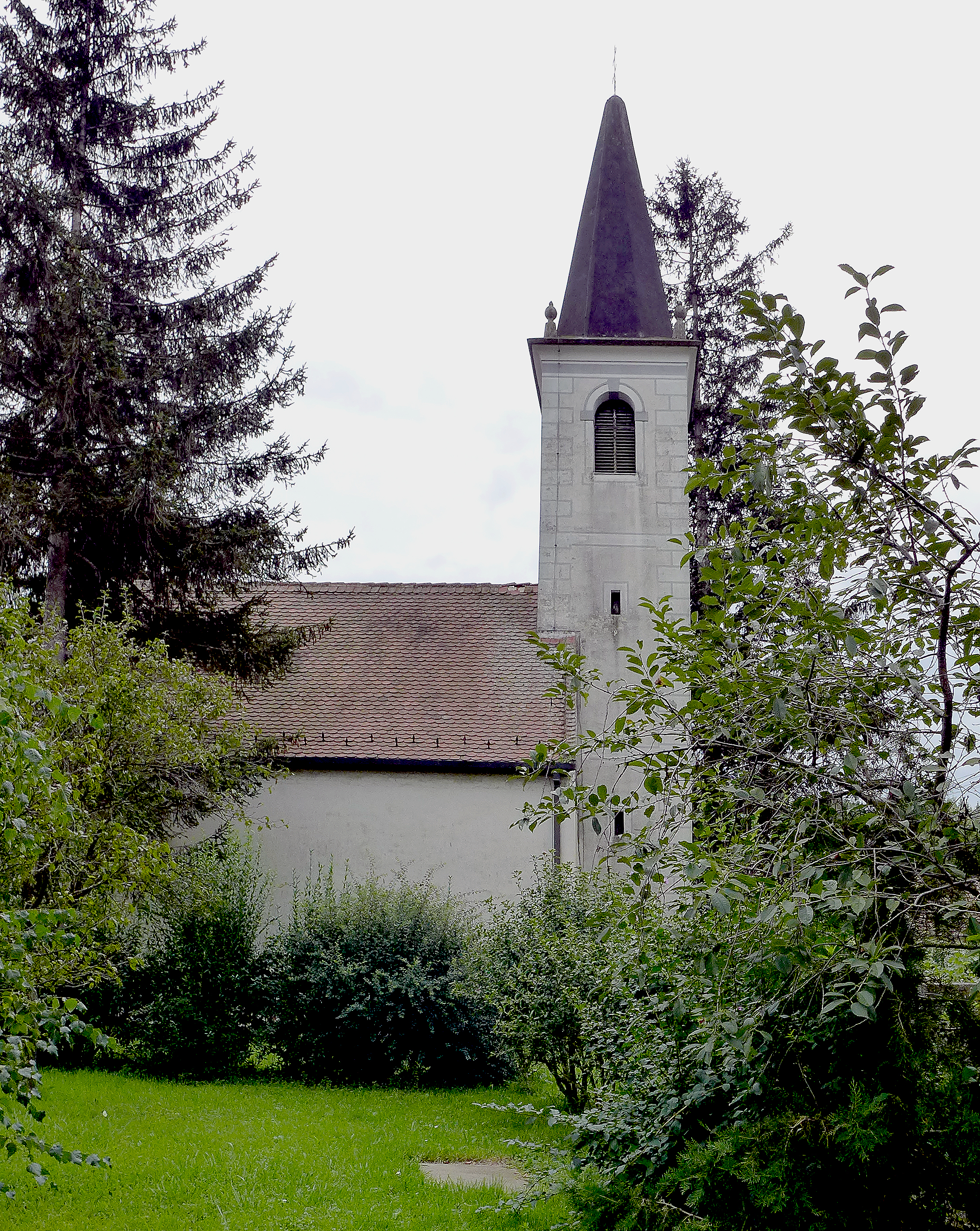 Nagygeresdi Szent István király római katolikus műemléktemplom (szentélye a 13. században épült)